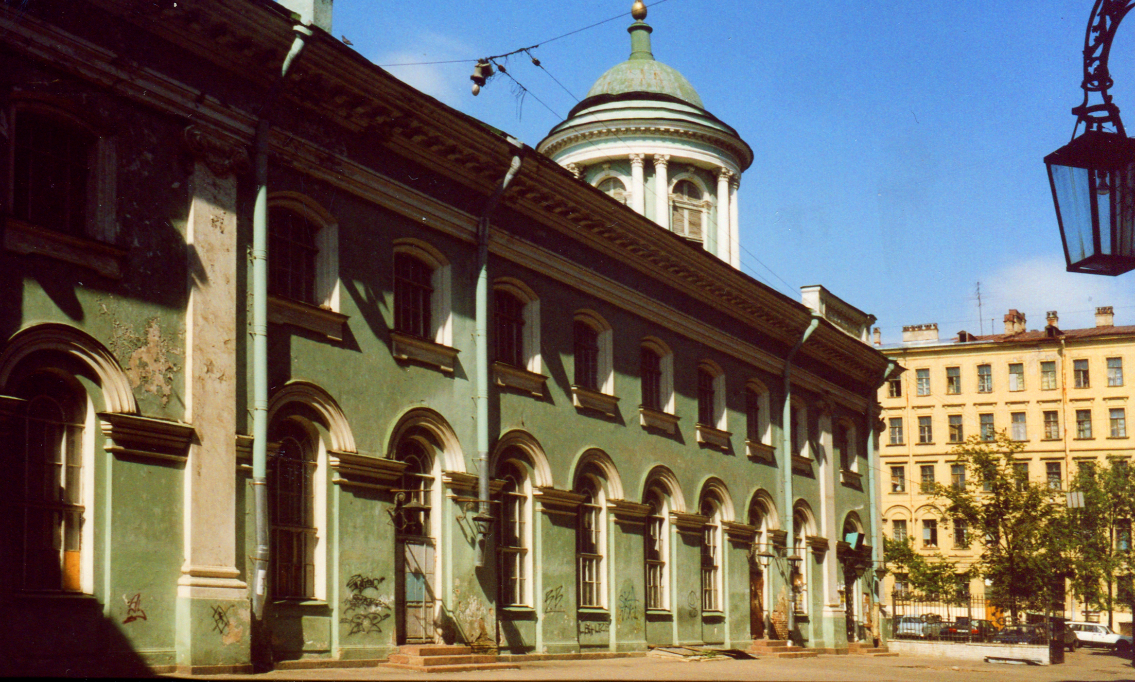 Фельтен Юрий Матвеевич (1730 - 1801) Кирха св.Анны.(1775 -1779) Кирочная ул.8